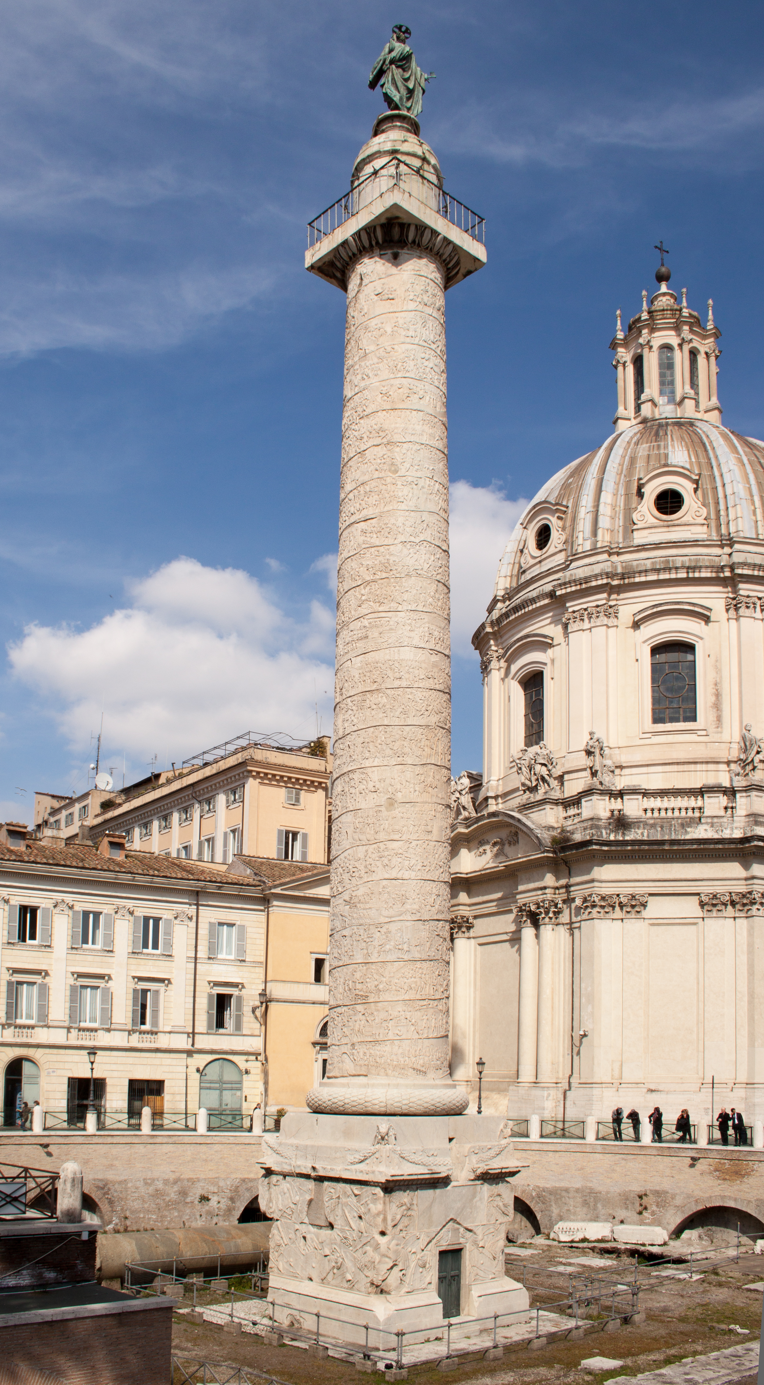 Trajan's column